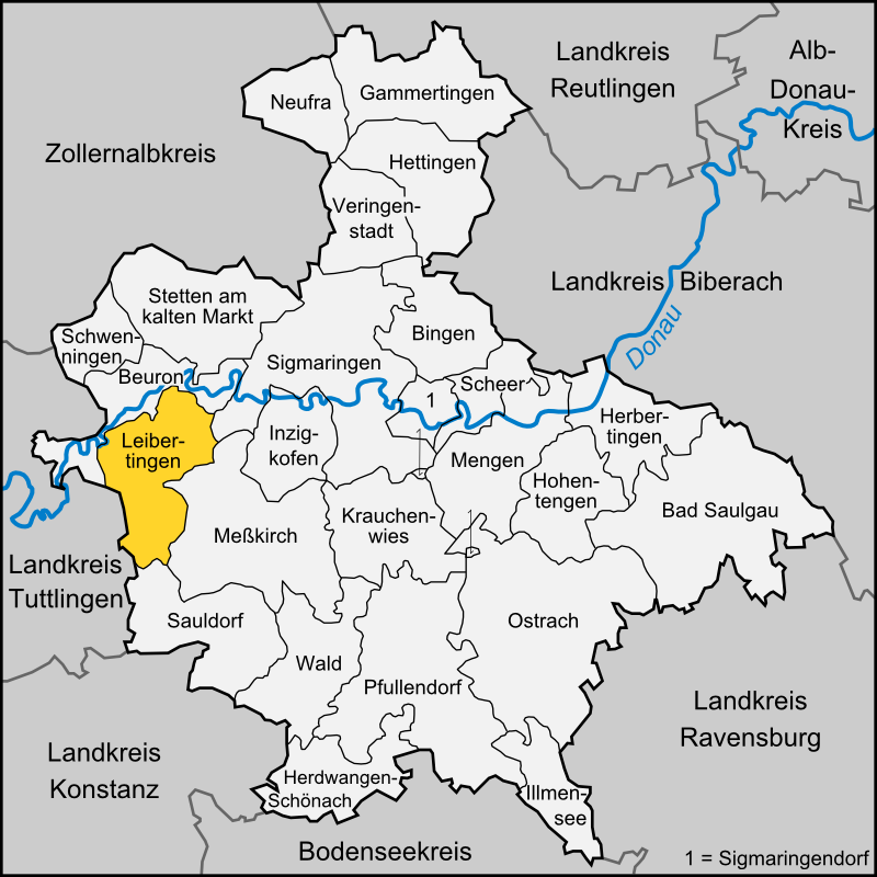 Karte der Gemeinde Leibertingen im Landkreis Sigmaringen